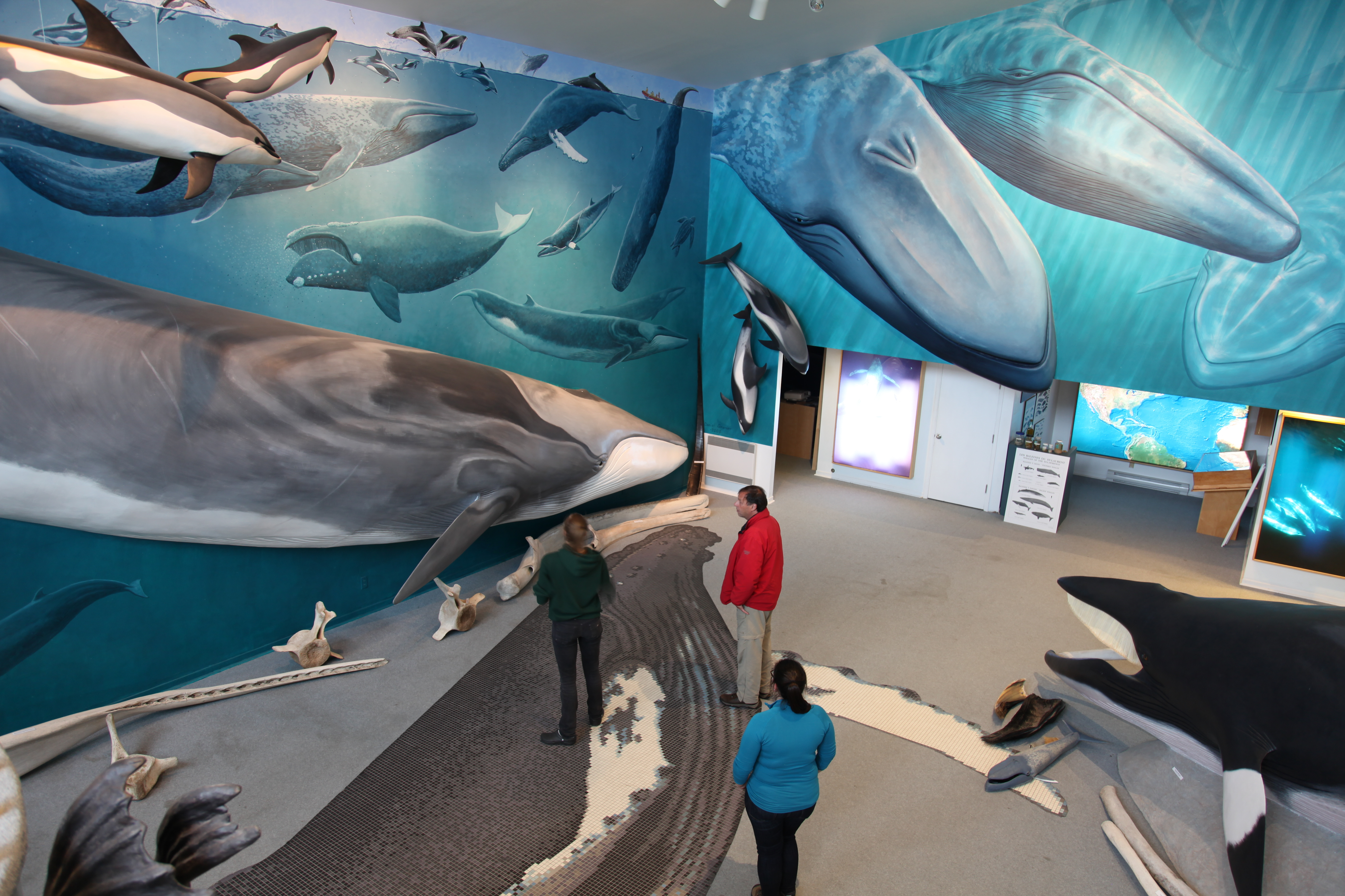 Museum der Walforschungsorganisation Mingan Island Cetacean Study (MICS) in Longue-Pointe-de-Mingan, Québec / Kanada. Die Wale sind als Halbrelief oder als Wandgemälde in natürlicher Grösse abgebildet.